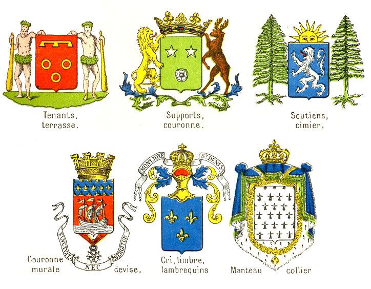 Ornements exterieurs en héraldique tels que présentés par le Larousse 1922 arousse 1922 Source scannés dans le Larousse 1922 par Nataraja-Shiva